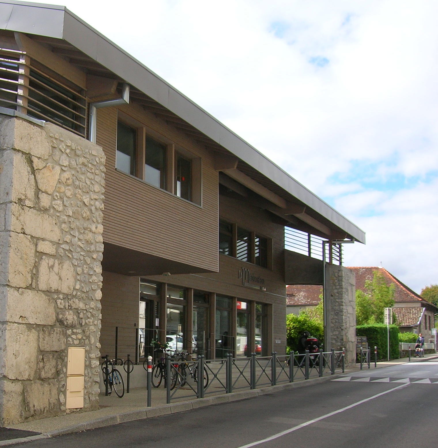 Bibliothèque - médiathèque de Crolles, Isère.